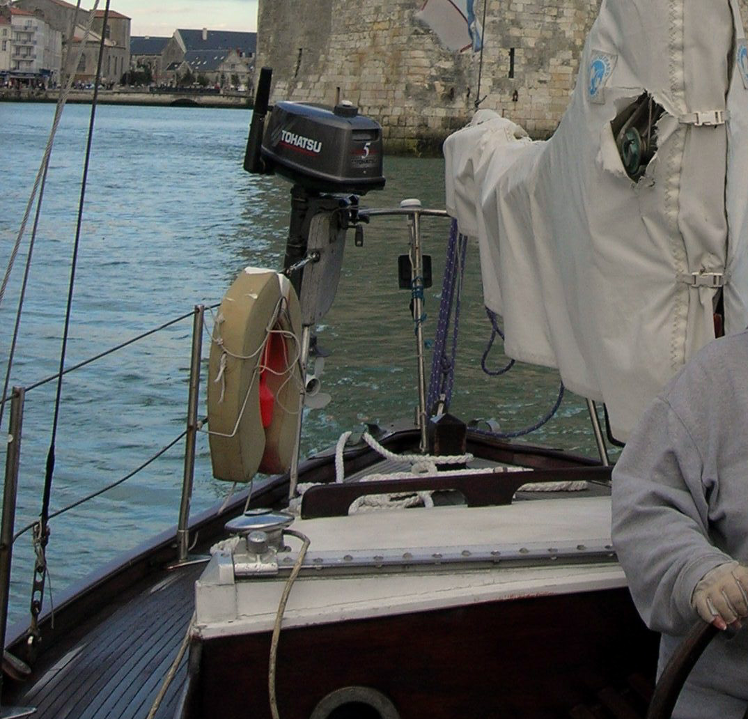 Description =Bateau de plaisance à arrière canoë. Source =Photo taken by Remi Jouan Date =Octobre 2005 Author =Remi Jouan